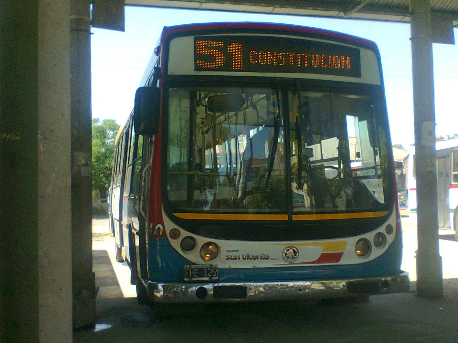 Unidad 240 de la línea 51 de Buenos Aires